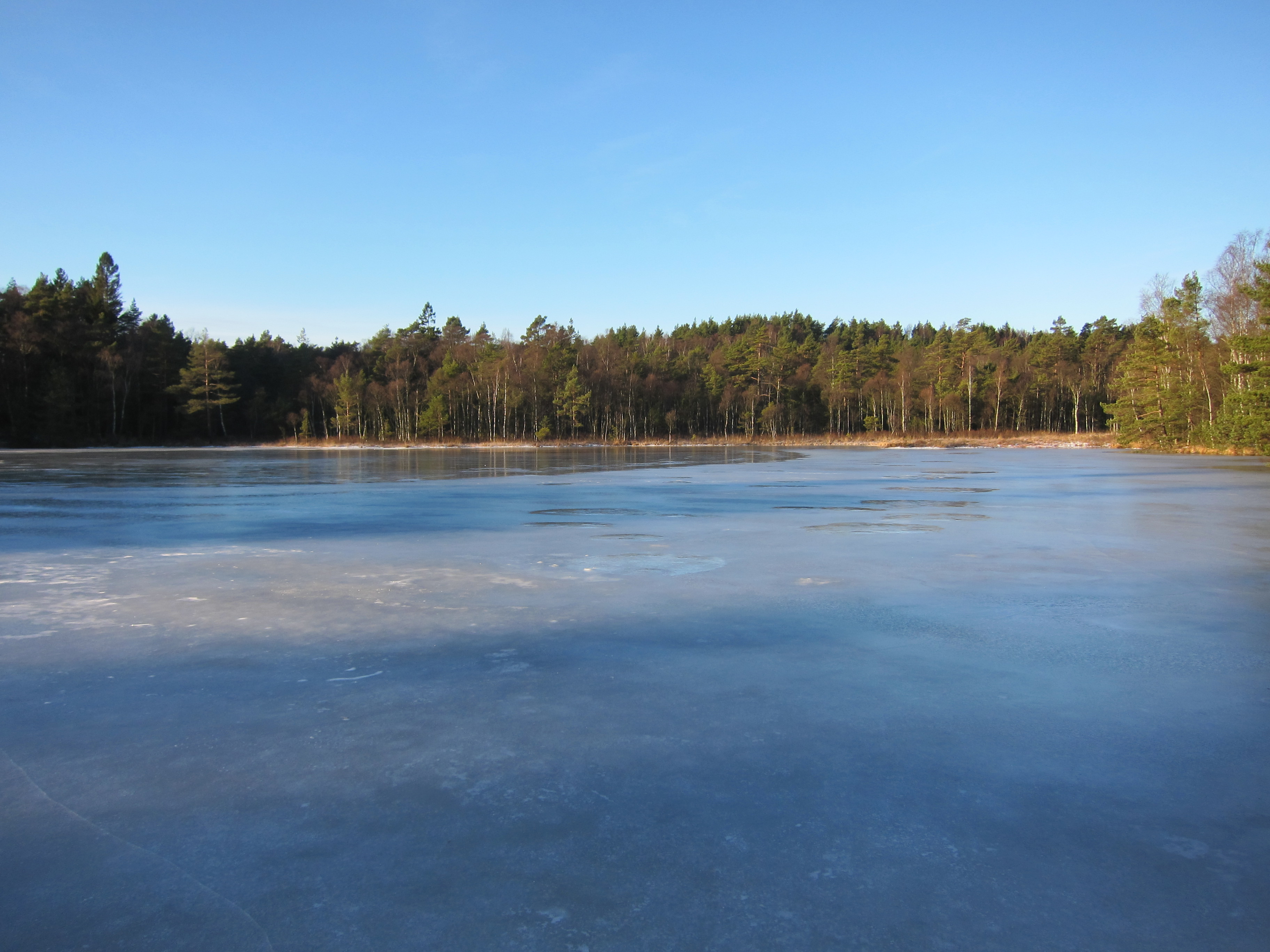 Surktjärn